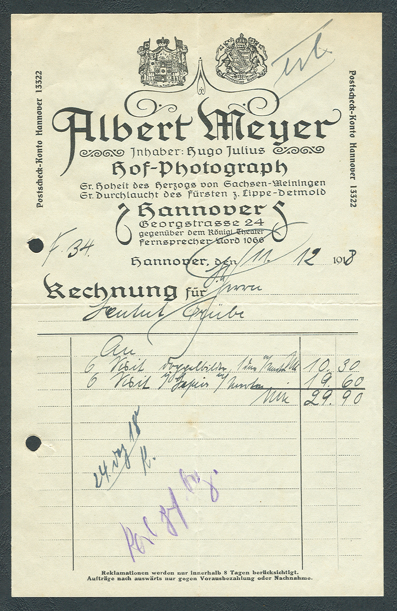 Original Rechnung, Teil-Abschrift: Albert Meyer, Inhaber Hugo Julius, Hof-Photograph, Seiner Hoheit des Herzogs von Sachsen-Meiningen, Seiner Durchlaucht des Fürsten zu Lippe-Detmold, Hannover, Georgstraße 24, gegenüber dem Königlichen Theater, Fernsprecher Nord 1066 Rechnung für (in Sütterlin "Frau ... Grübe, an 6 Visit Doppelbilder..." Weitere Forschung und Dokumente/Belege stehen noch aus. Die angegebene Hausnummer entspricht nicht mehr der Nachkriegs-Zählung; von dem damaligen Gebäude (mit der sogenannten "Wärmehalle") ist lediglich die Erdgeschoss-Fassade großteils erhalten.